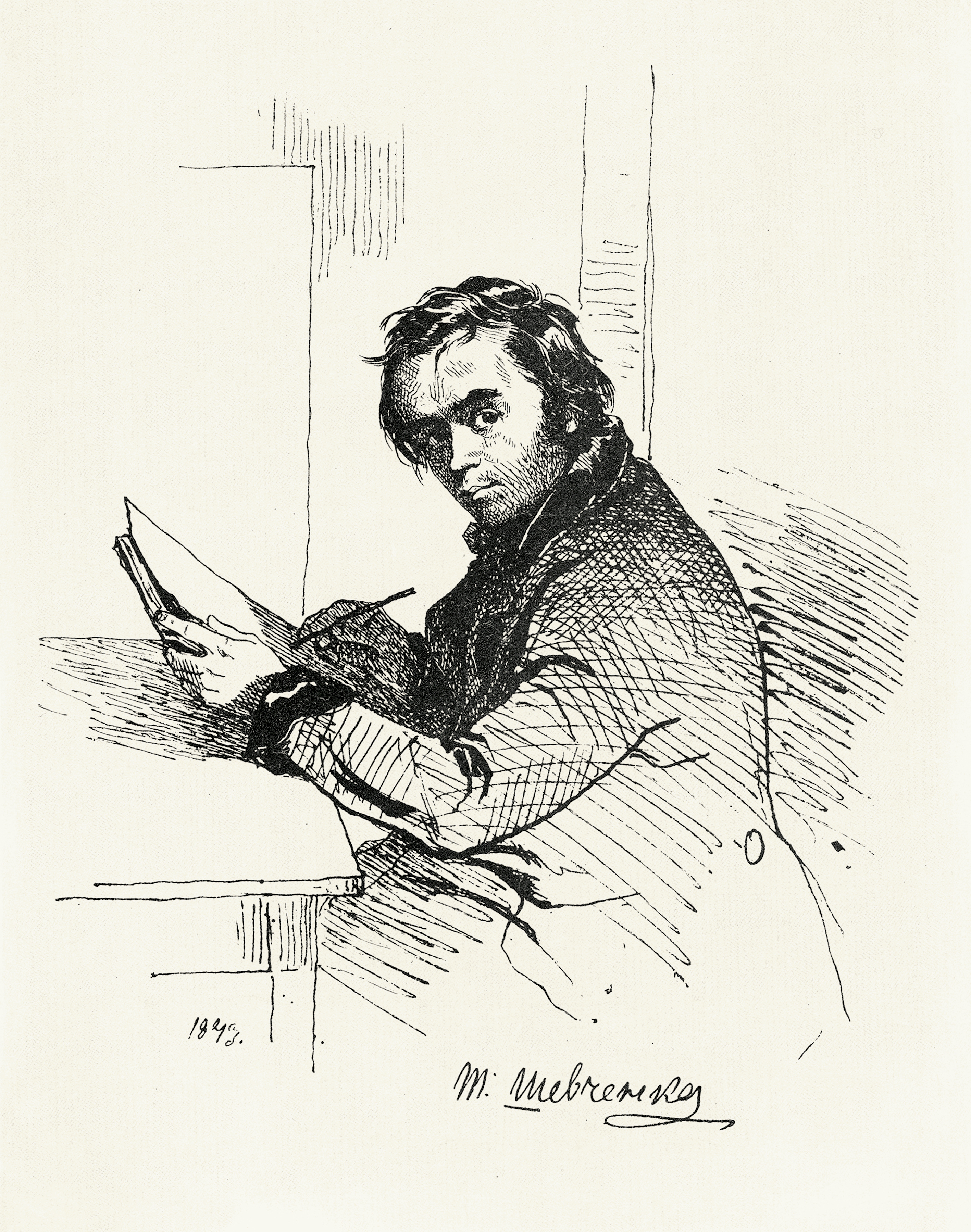 Автопортрет, подарований 1843 р. Варварі Рєпніній, виконано у дзеркальному відображенні. Це зображення недзеркальне (пряме). Даруючи В. Рєпніній рукопис поеми «Тризна», Шевченко пообіцяв наступного дня (28 листопада 1843) додати до нього автопортрет. В. Рєпніна зберігала подарований Шевченком автопортрет до кінця життя (1891). Місця зберігання: з 1843 – власність В. М. Рєпніної; з 1891 – Є. М. Орлової; з 1935 у колекції І. С. Зільберштейна; з 1985 – Музей приватних колекцій Державнго музю образотворчих мистецтв імені О. С. Пушкіна (Москва).